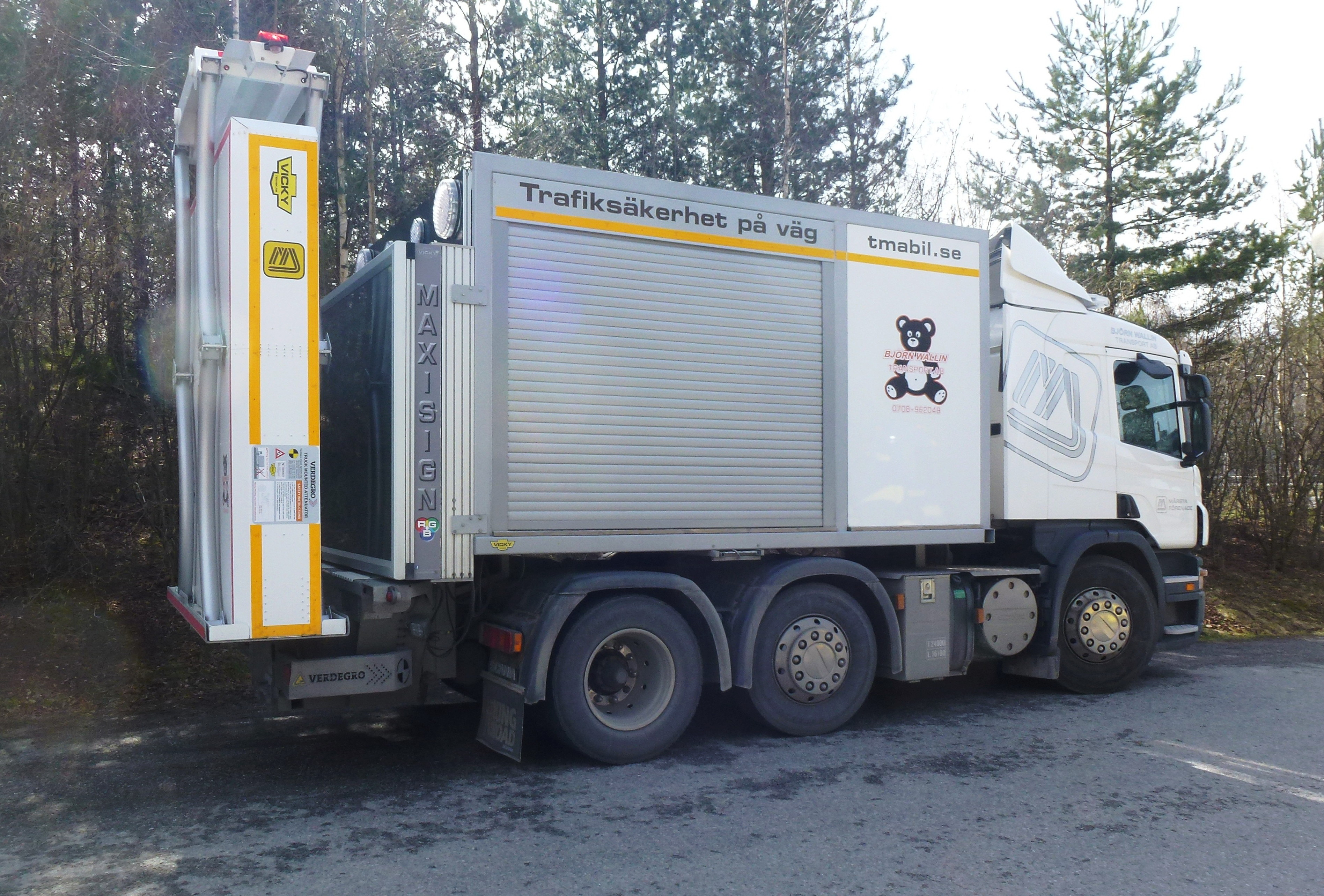 En TMA-bil i Stockholm (med uppfällt påkörningsskydd)